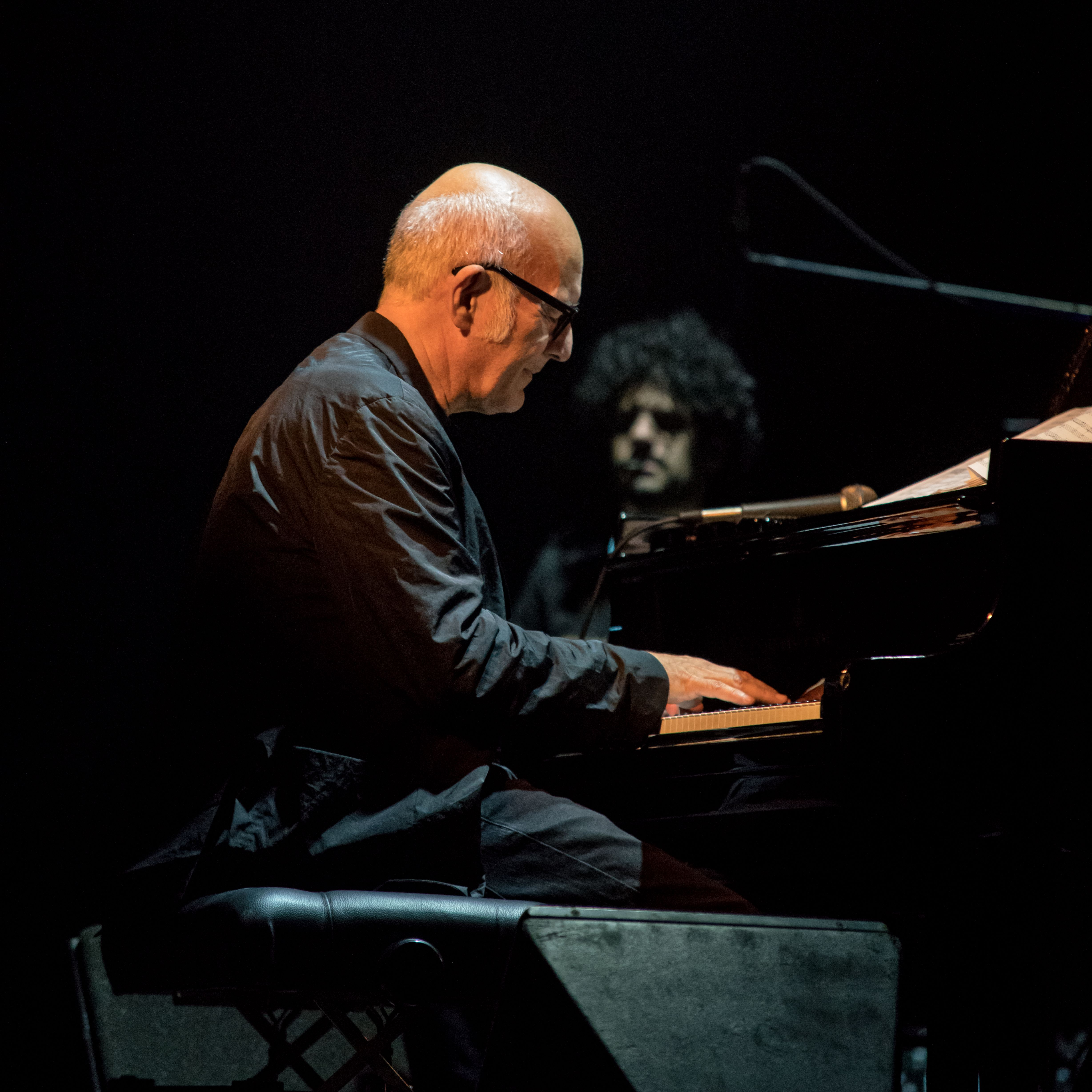 Bilder vom Zelt Musik Festival 2016 in Freiburg im Breisgau Ludovico Einaudi und Ensemble